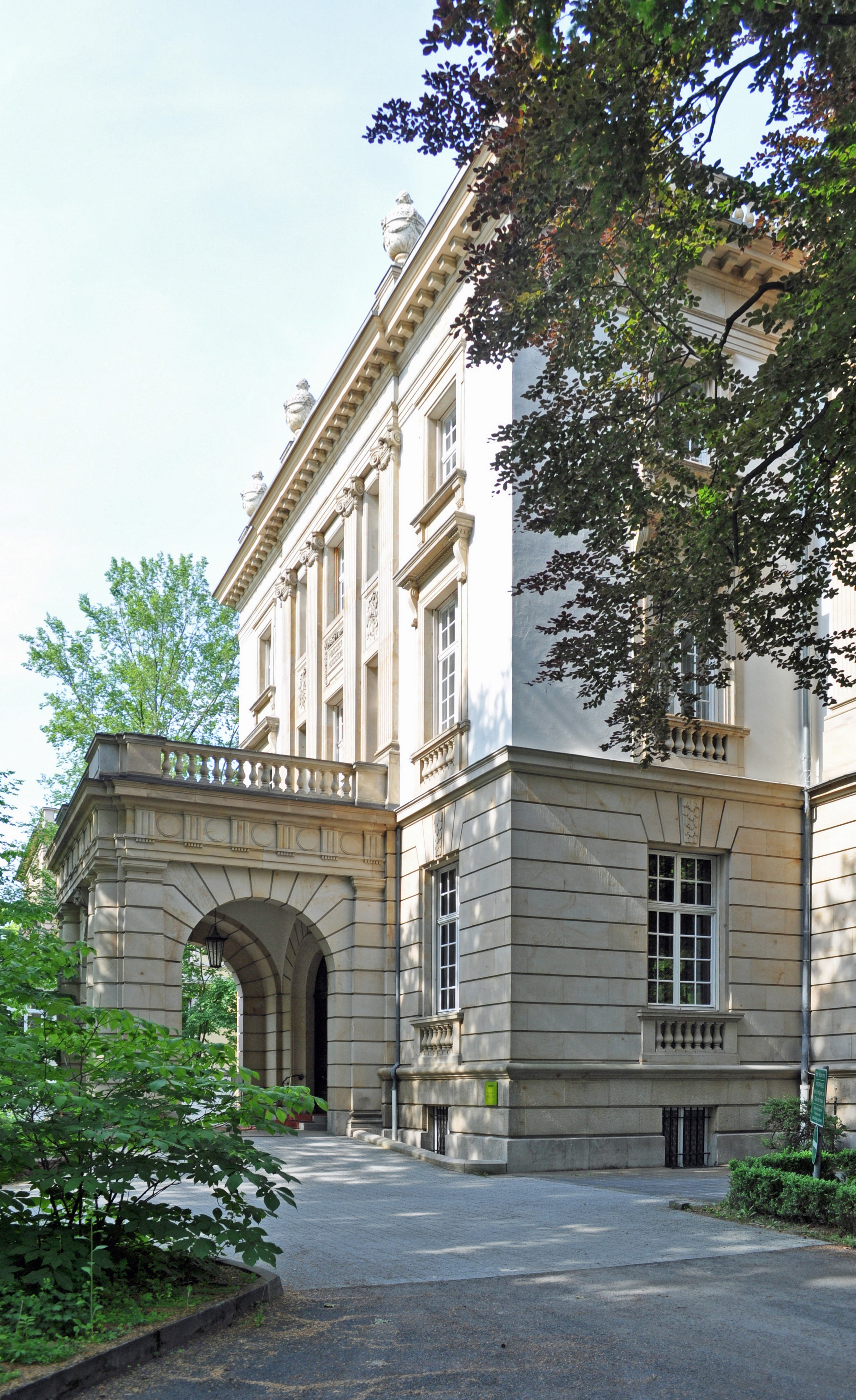 Villa Bonn, Vorbau